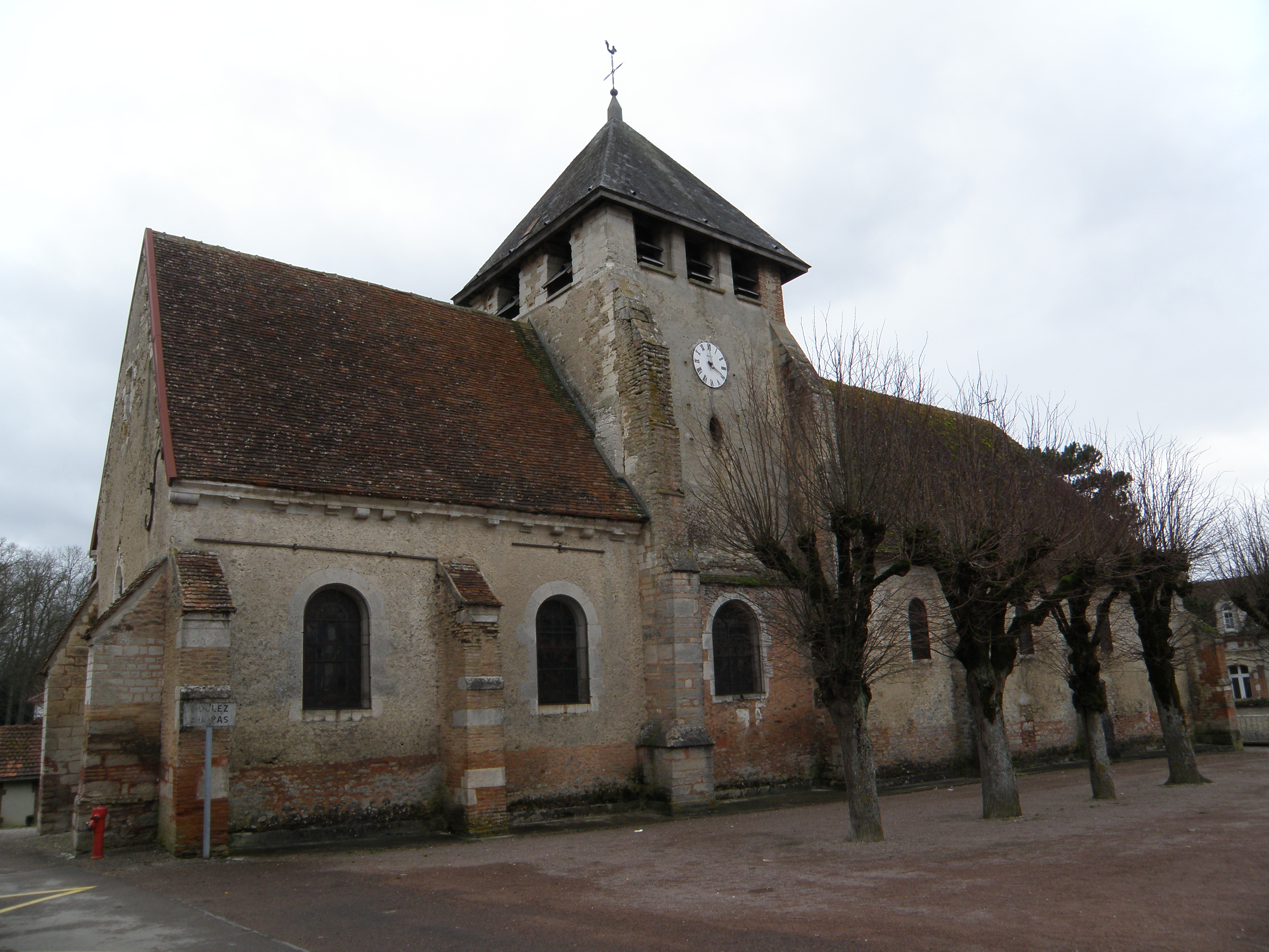 Église Saint-Pierre-aux-Liens, 10390 Clérey